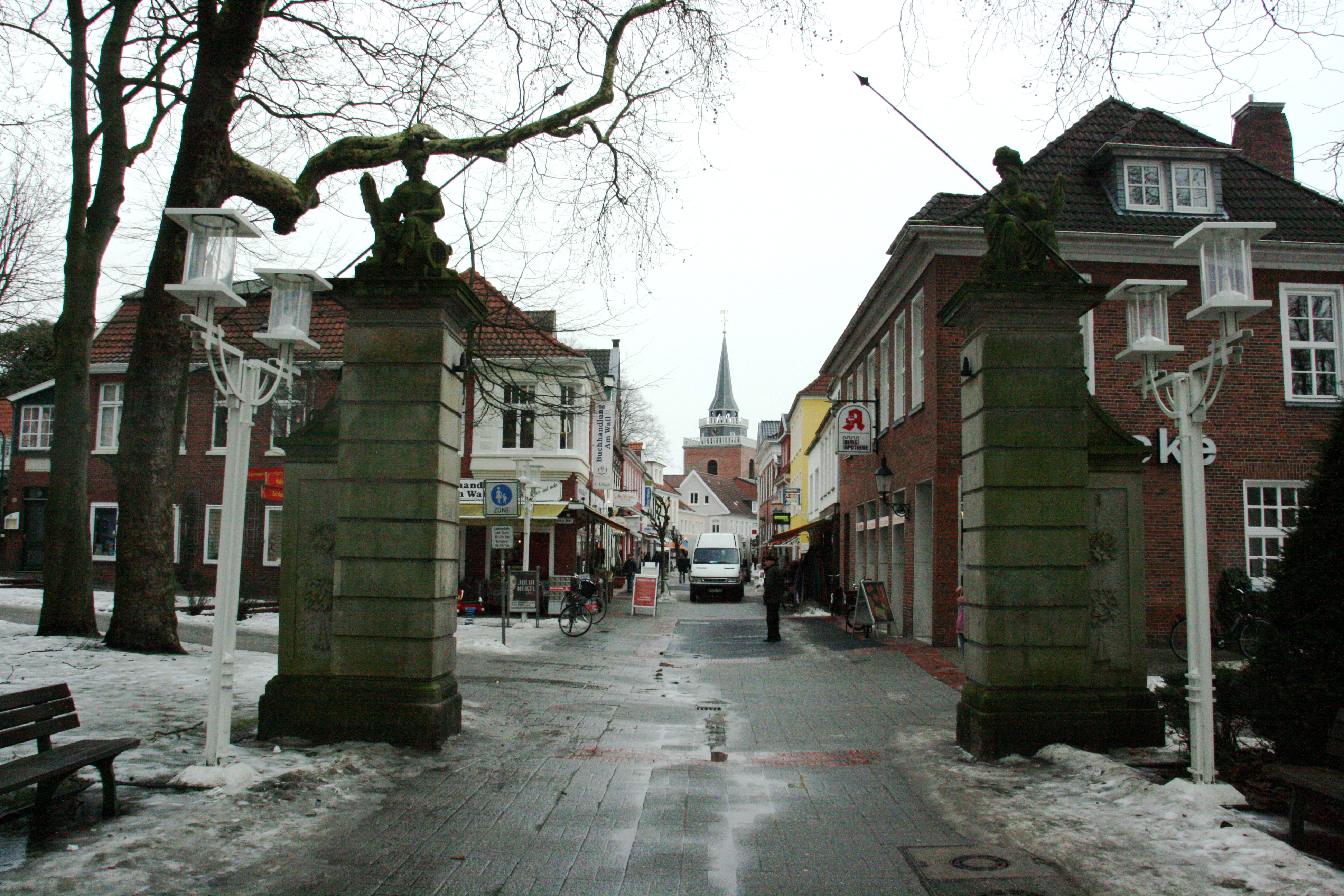 Fußgängerzone Aurich